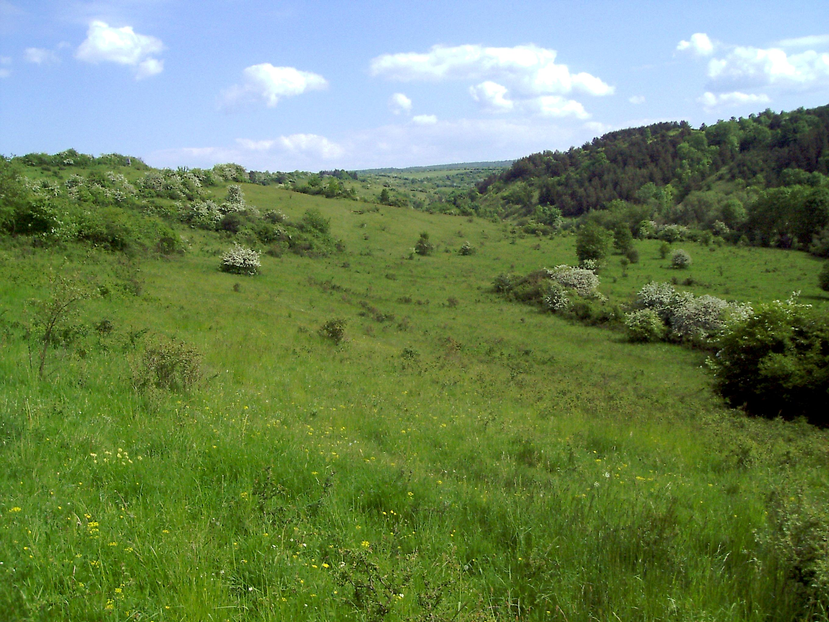 Das Flachstal im Mai von Südwesten aus gesehen. Blick nach Norden in Richtung Mühlhäuser Hardt. Weißdornblüte.